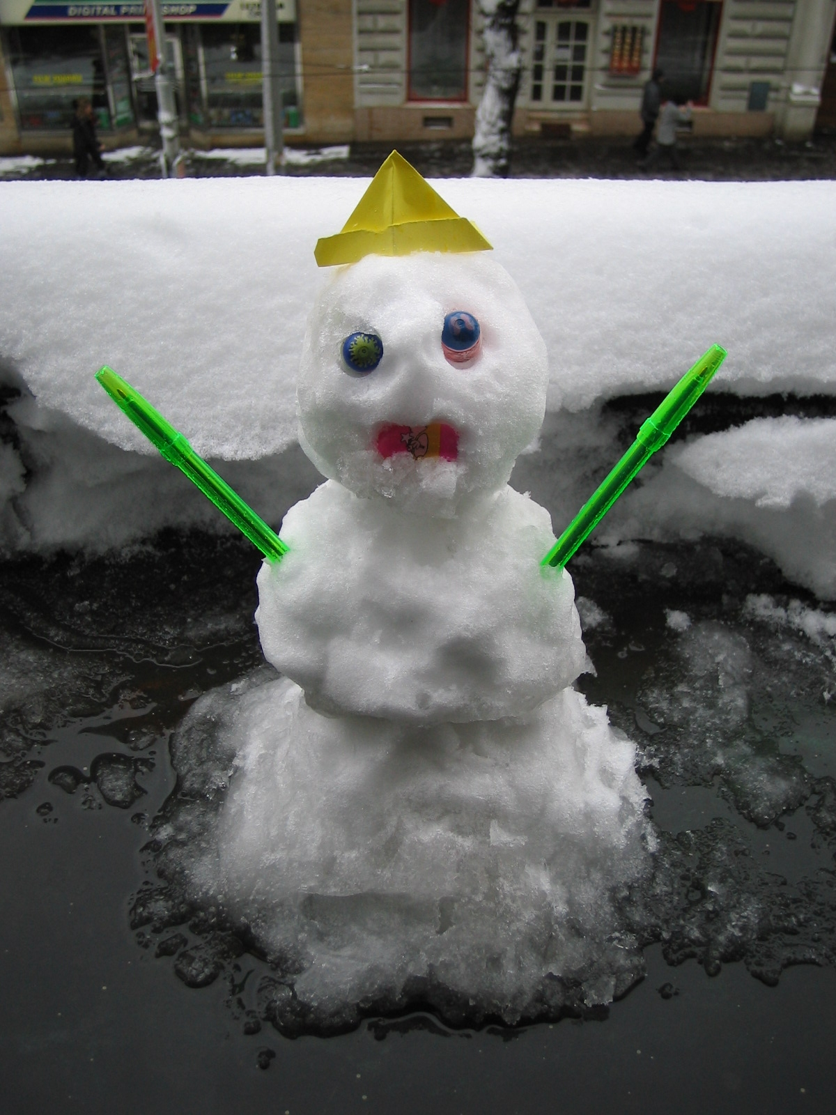 Urbanizovaný sněhulák.